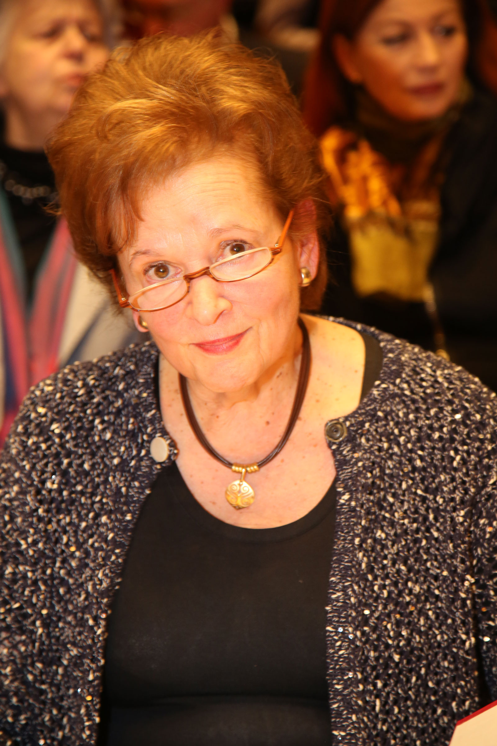 Prof. Maria Venuti, geboren 1953 in USA, in Deutschland lebende Sopranistin und Gesangspädagogin.